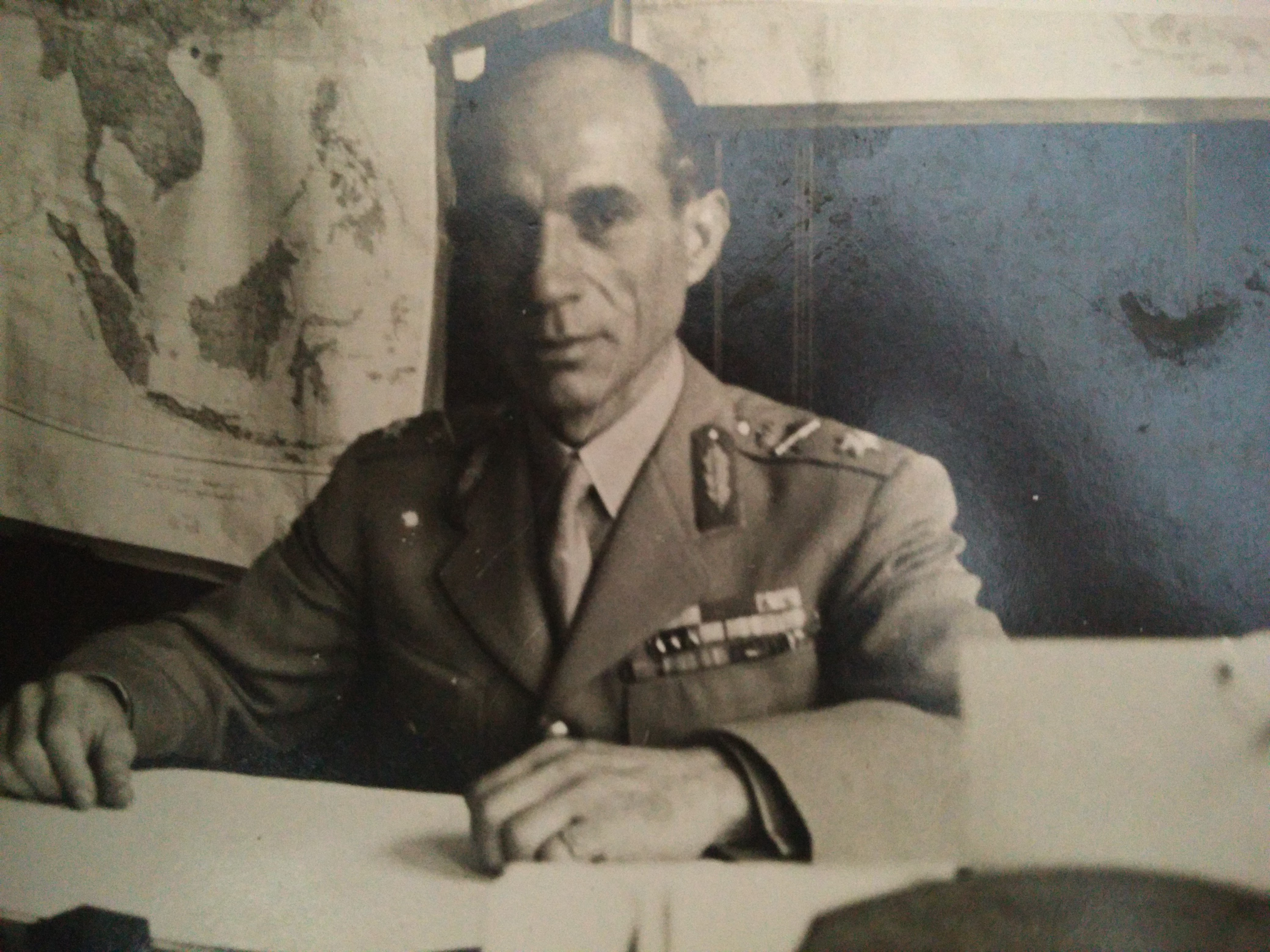 Υποστράτηγος